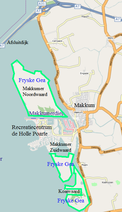 Makkum, Makkumer Djip